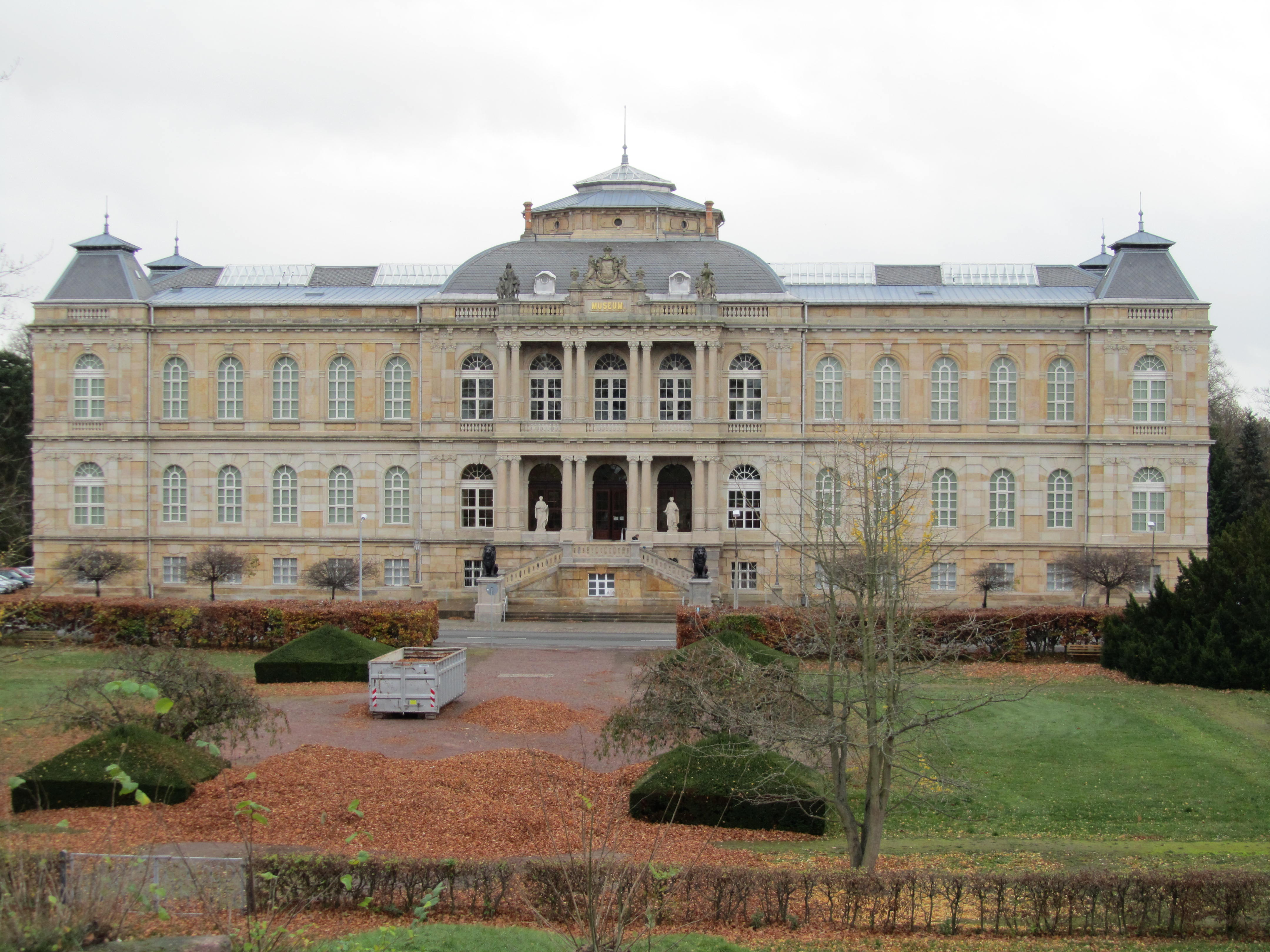 Das Herzogliche Museum in Gotha nach der Sanierung.